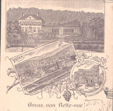 Villa Bellevue in Trier, Ausschnitt aus einer Ansichtskarte (1896 gelaufen)